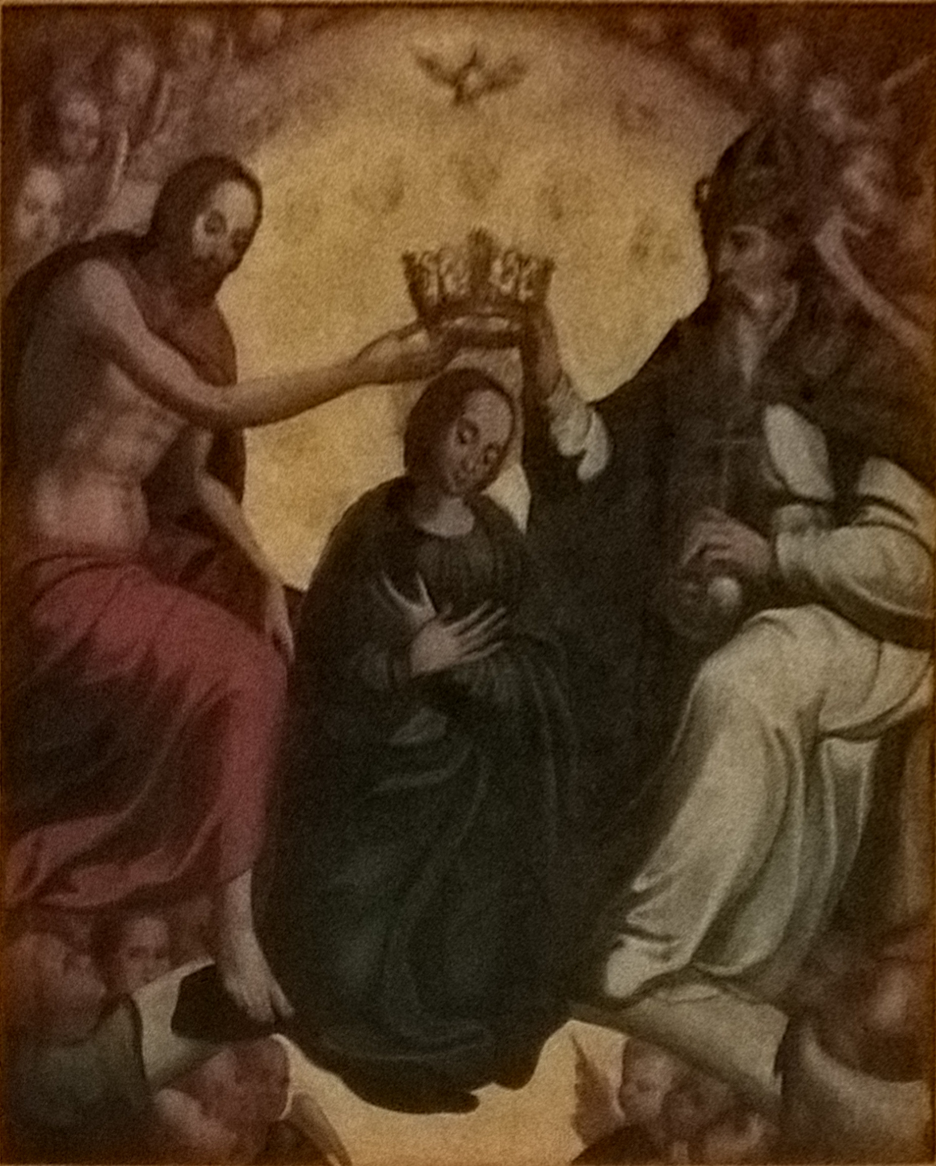 Pintura a óleo sobre tela "Coroação da Virgem" do Mestre de Arruda dos Vinhos, integrante do Políptico quinhentista da Matriz de Arruda dos Vinhos, de cerca de 1550